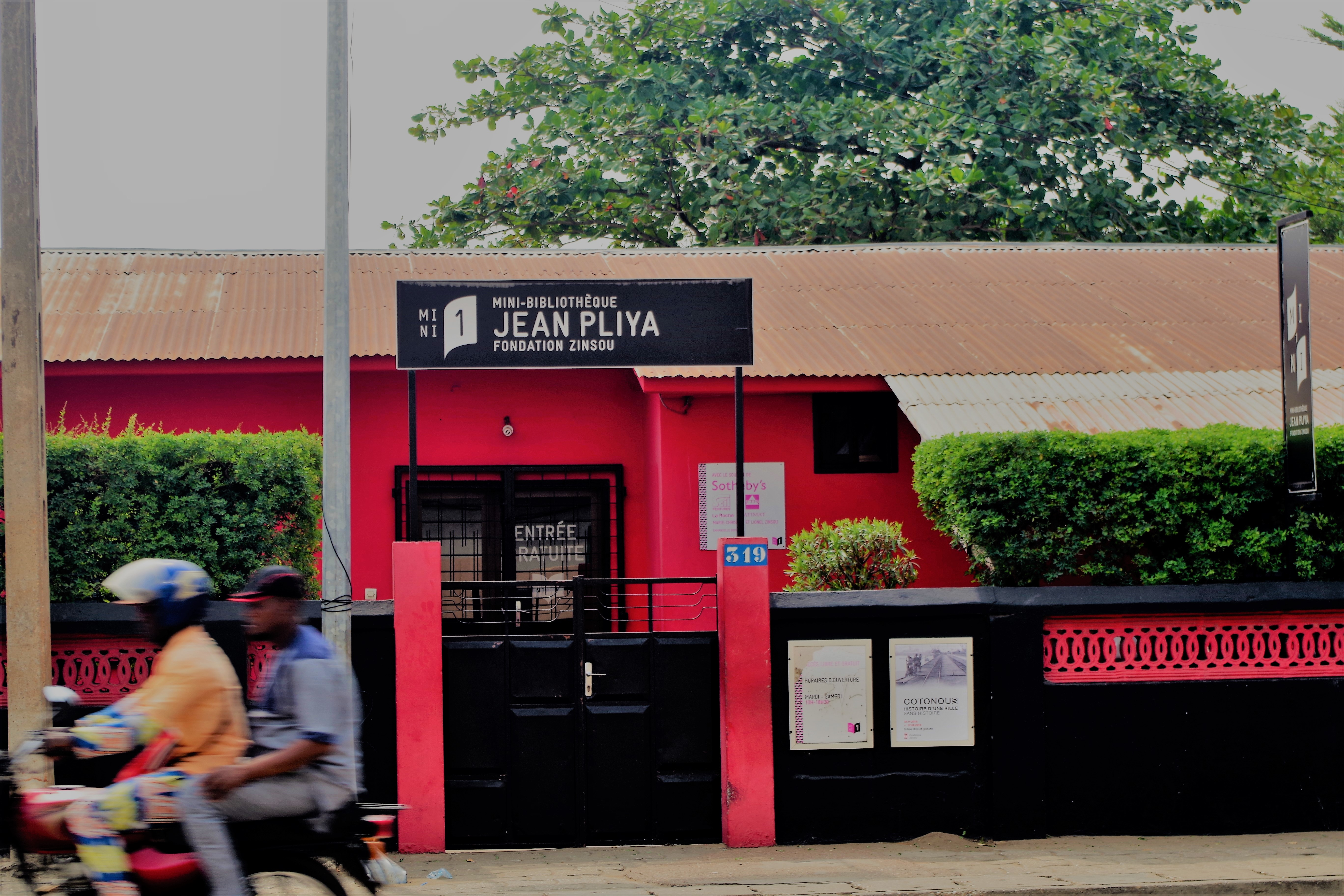 C'es pour relever le challenge d'accès légitime de la jeunesse à la lecture, que la Fondation Zinsou a décidé de créer les Mini-bibliothèques au cœur des quartiers de Cotonou et au plus près des établissements scolaires publics, un réseau gratuit de petites structures accessibles à tous, pourvues de livres neufs et proposant des installations modernes et accueillantes.